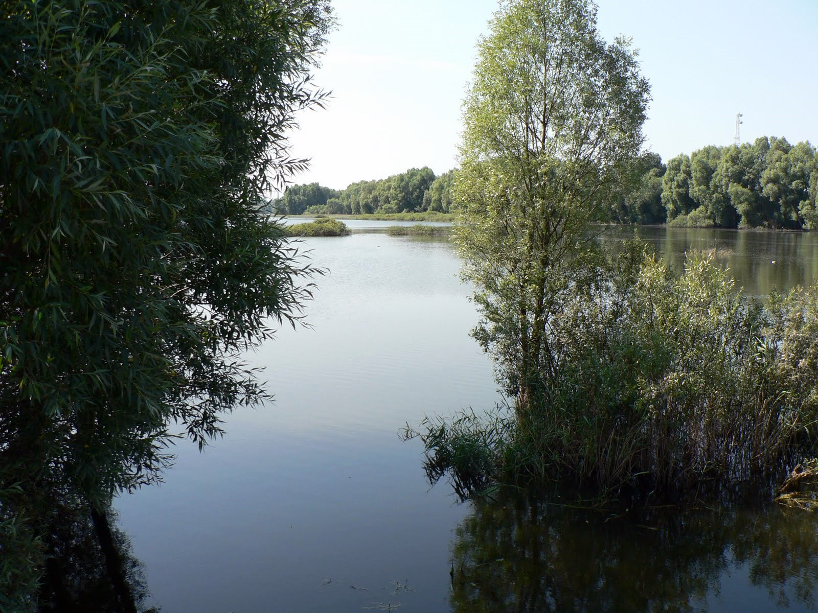 Widok z grobli na Jeziorze Pakoskim